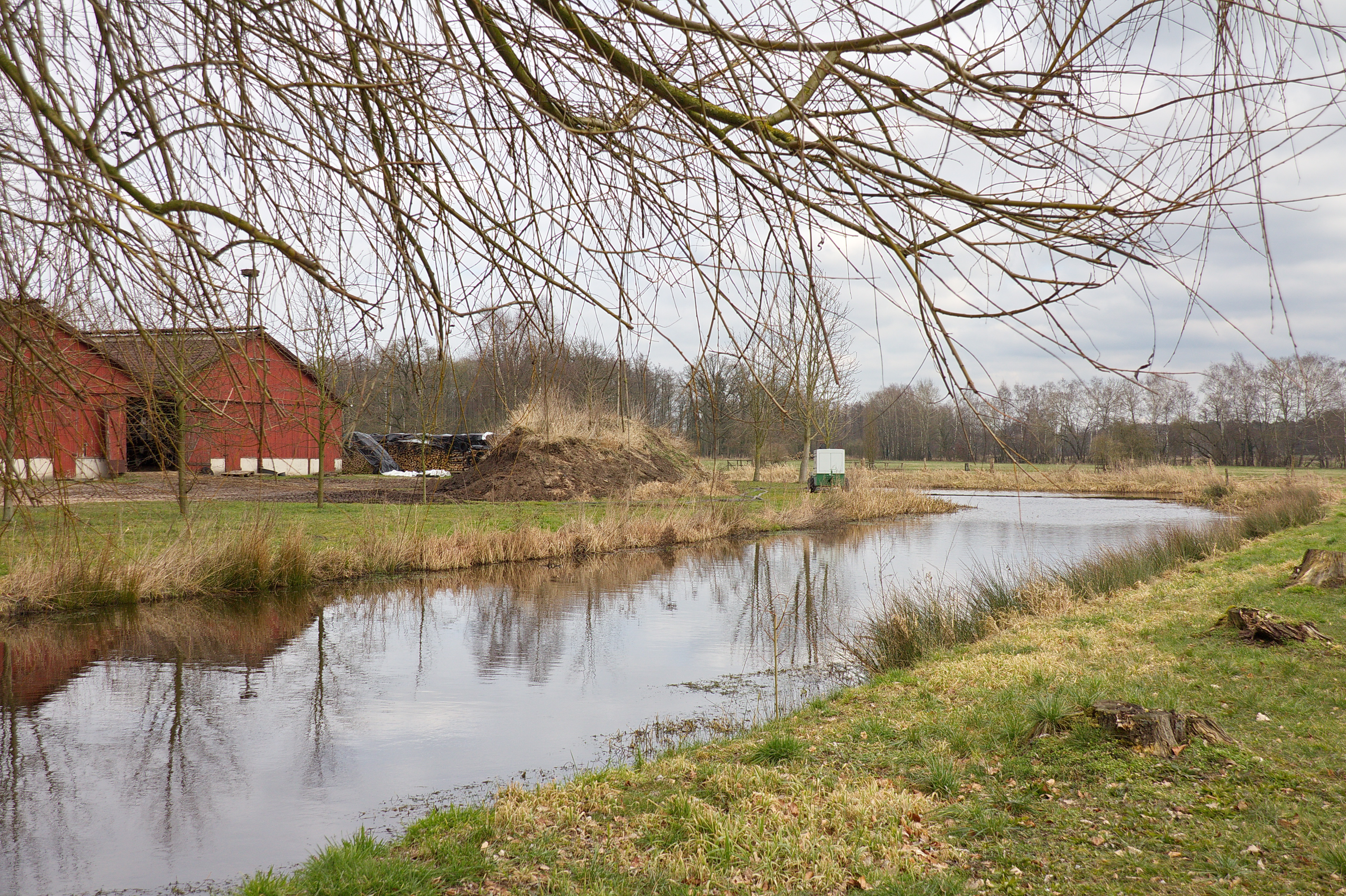 Der Fluss Böhme am Rittergut Böhme in Böhme, Niedersachsen, Deutschland